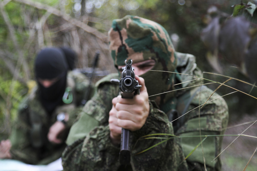 Боевая подготовка военнослужащих 22-й отдельной бригады специального назначения.